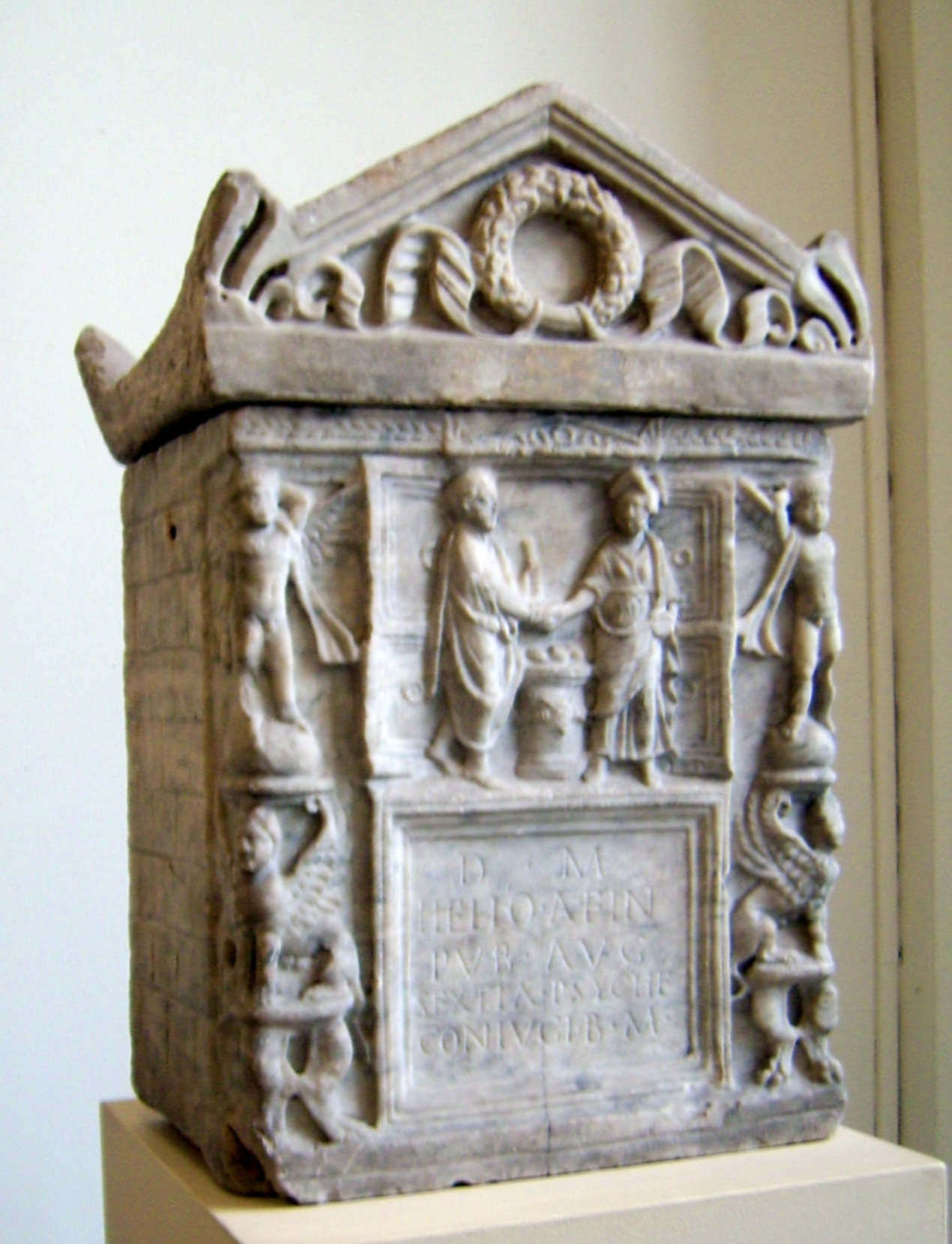 Eckige Marmourne mit nicht zugehörigem Deckel, Stadtrömisch, Anfang des 2. Jahrhunderts, gefunden in Rom, aus der Sammlung Silvio Rione Arenula, seit dem 17. Jahrhundert in Berlin nachweisbar, Höhe des Kastens 53 cm, Breite 35,5 cm